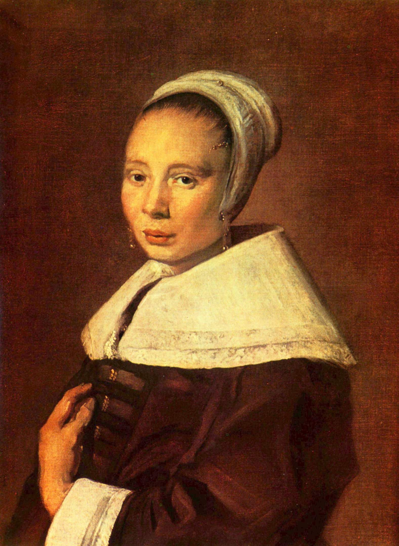 Pendant of File:Frans Hals 054.jpg